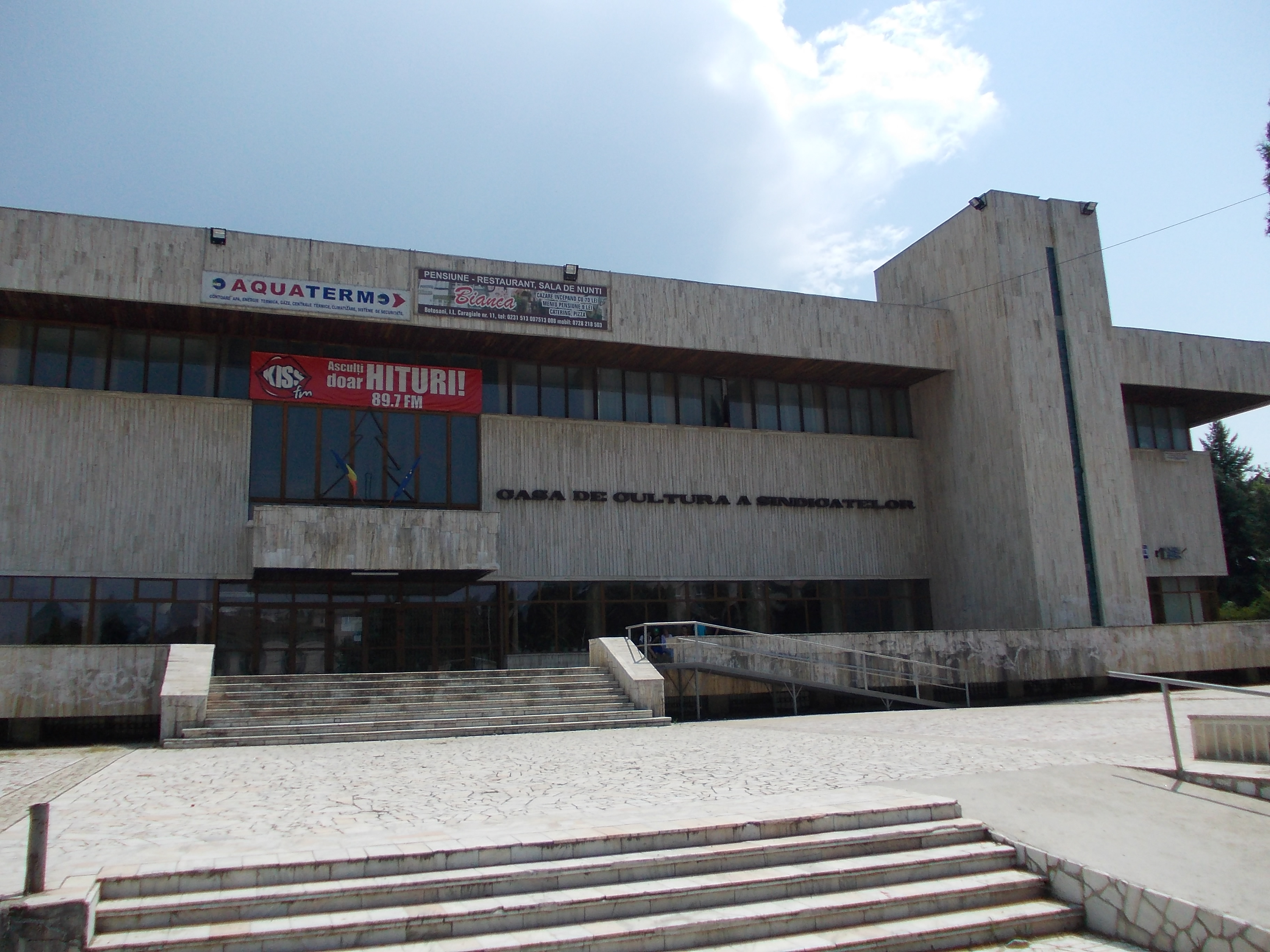 casa de cultură din Botoşani